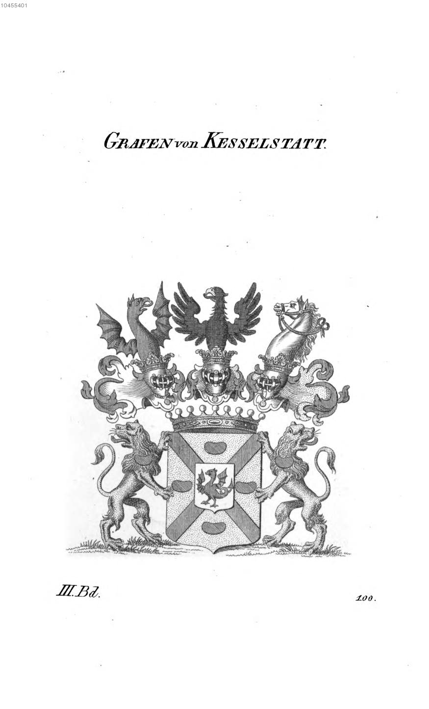 Wappen Kesselstatt - Tyroff AT.jpg